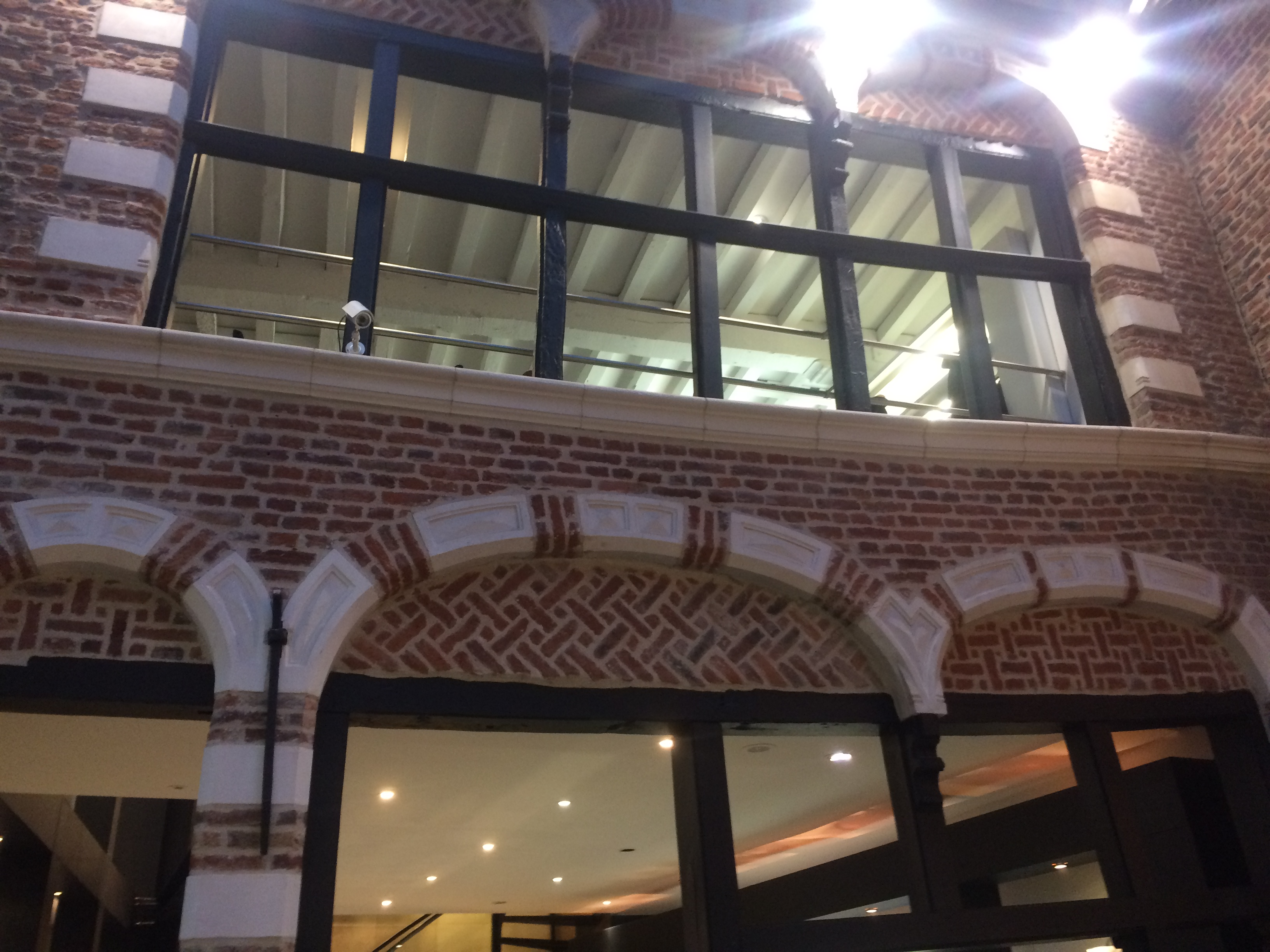 Maison à arcures au 14 rue Lepelletier.